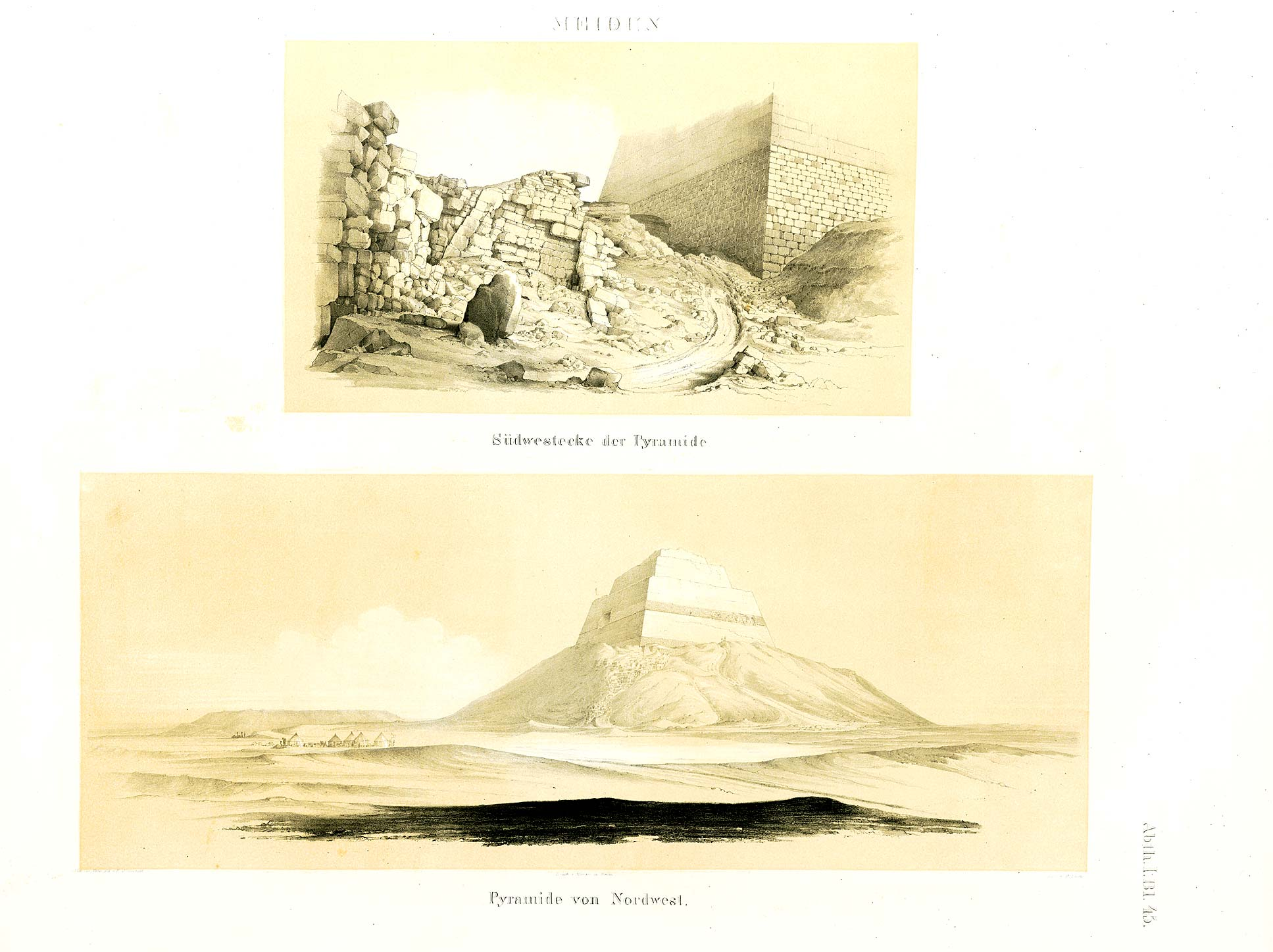 Denkmaeler aus Aegypten und Aethiopien nach den Zeichnungen der von Seiner Majestät dem Koenige von Preussen, Friedrich Wilhelm IV., nach diesen Ländern gesendeten, und in den Jahren 1842–1845 ausgeführten wissenschaftlichen Expedition auf Befehl Seiner Majestät